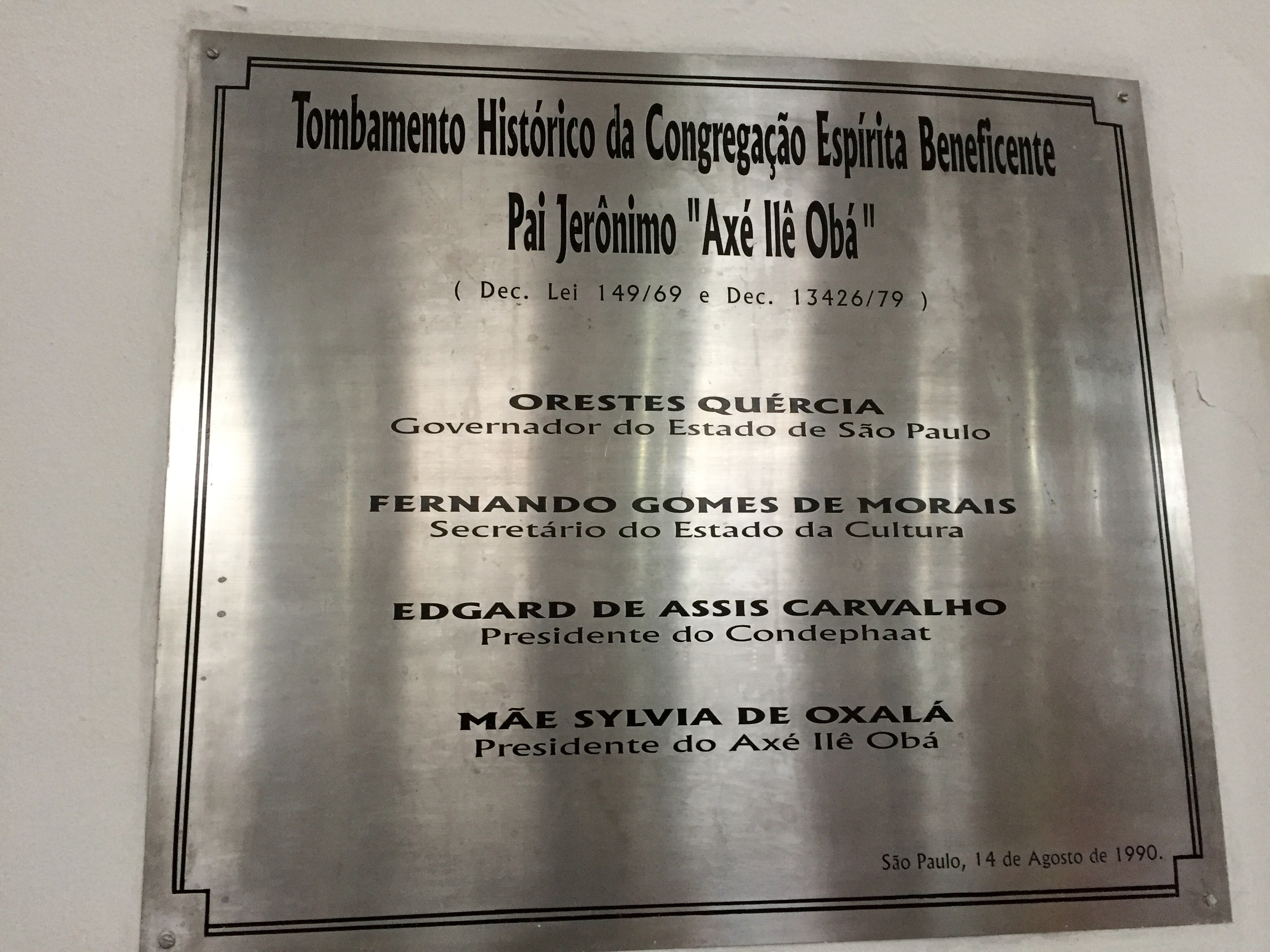 Placa do tombamento do Axé Ilê Obá, em São Paulo (SP), Brasil.